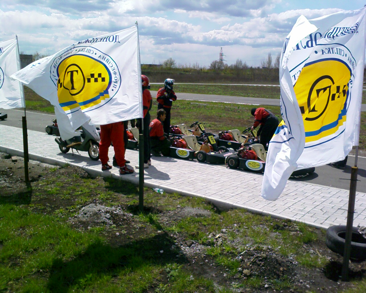 Подготовка к любительской картинговой гонке на картодроме "Донбасс-карт" в г.Донецке